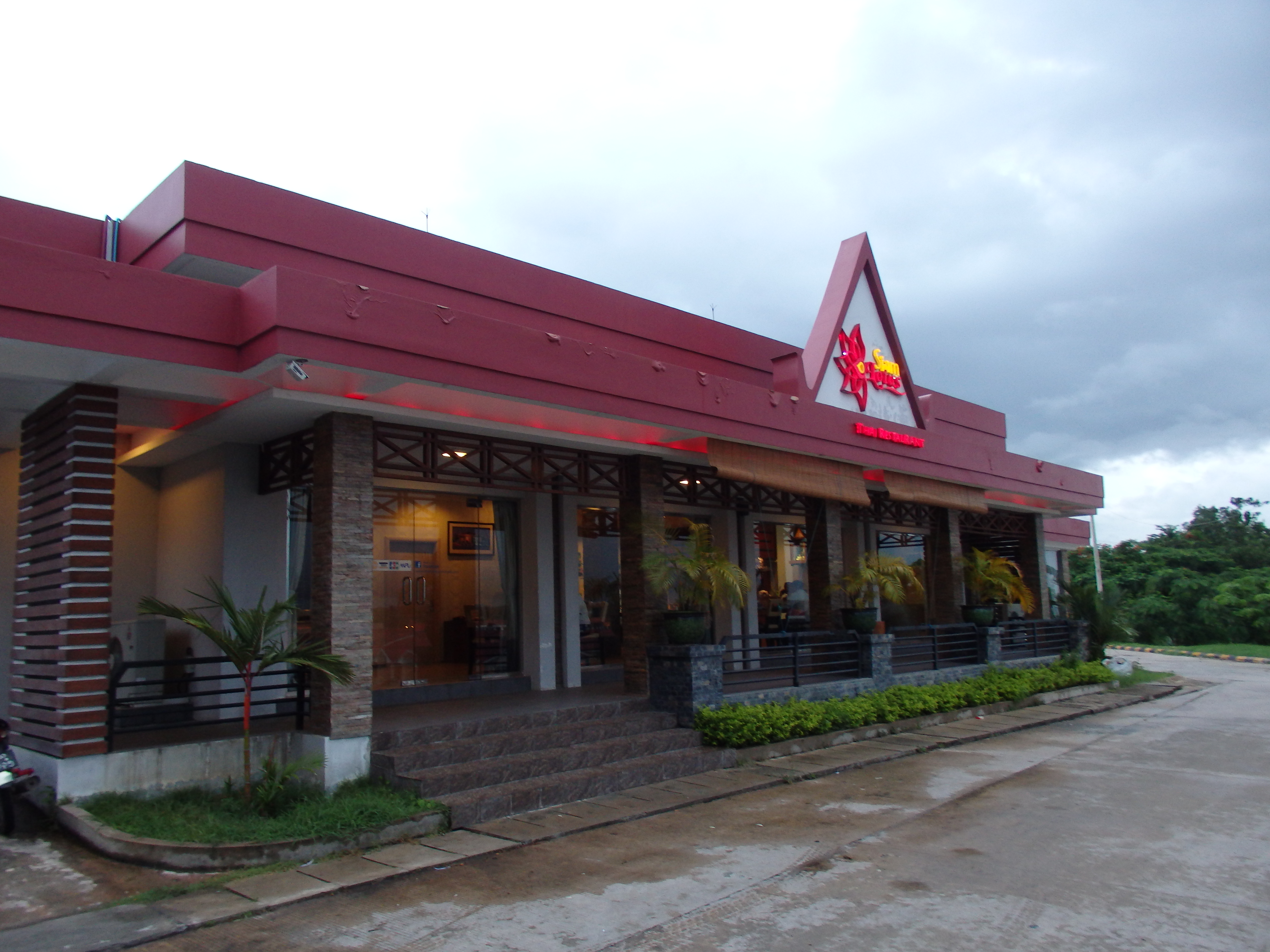 Thai Restaurant